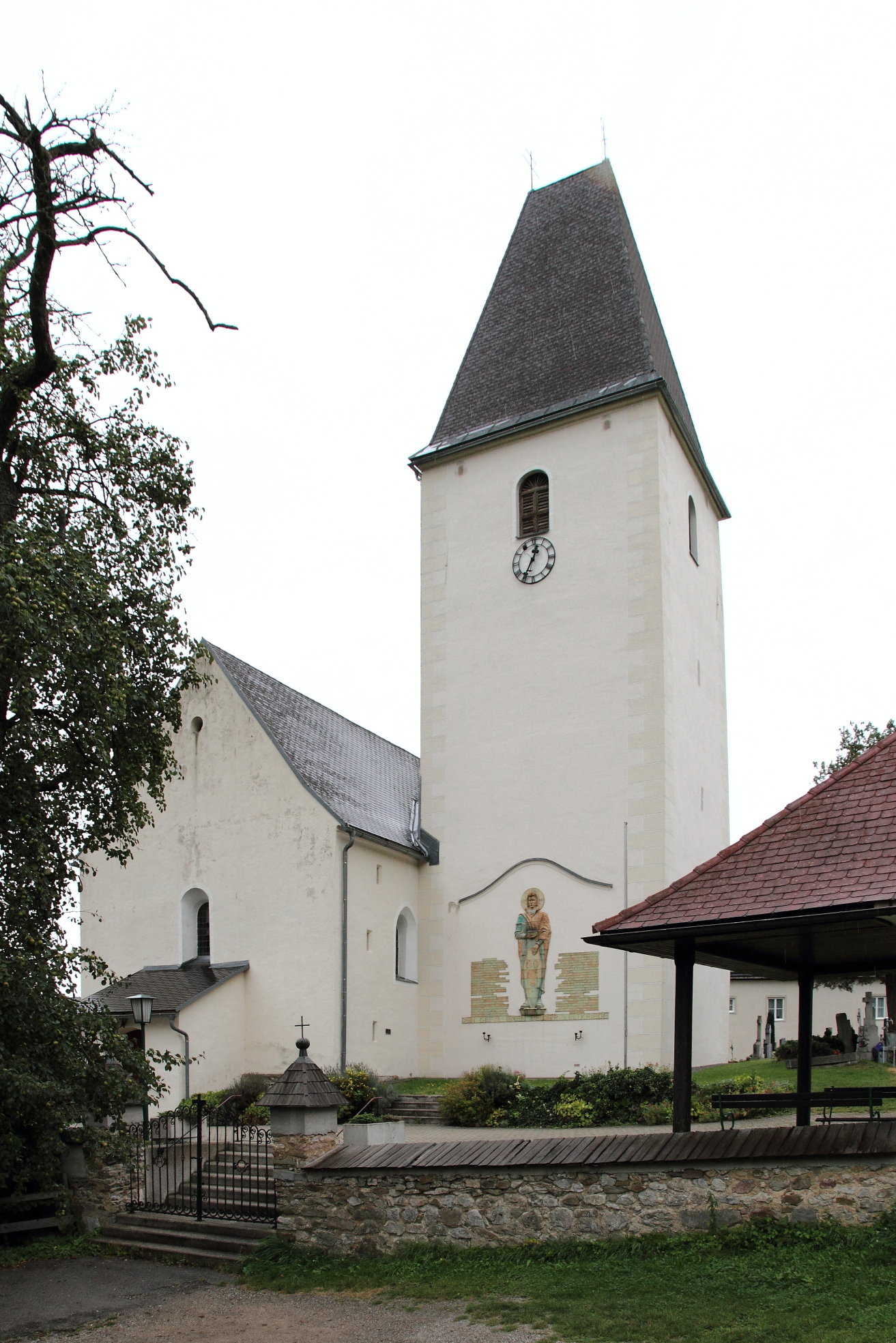 Katholische Pfarrkirche hl. Katharina in der niederösterreichischen Gemeinde Eschenau.